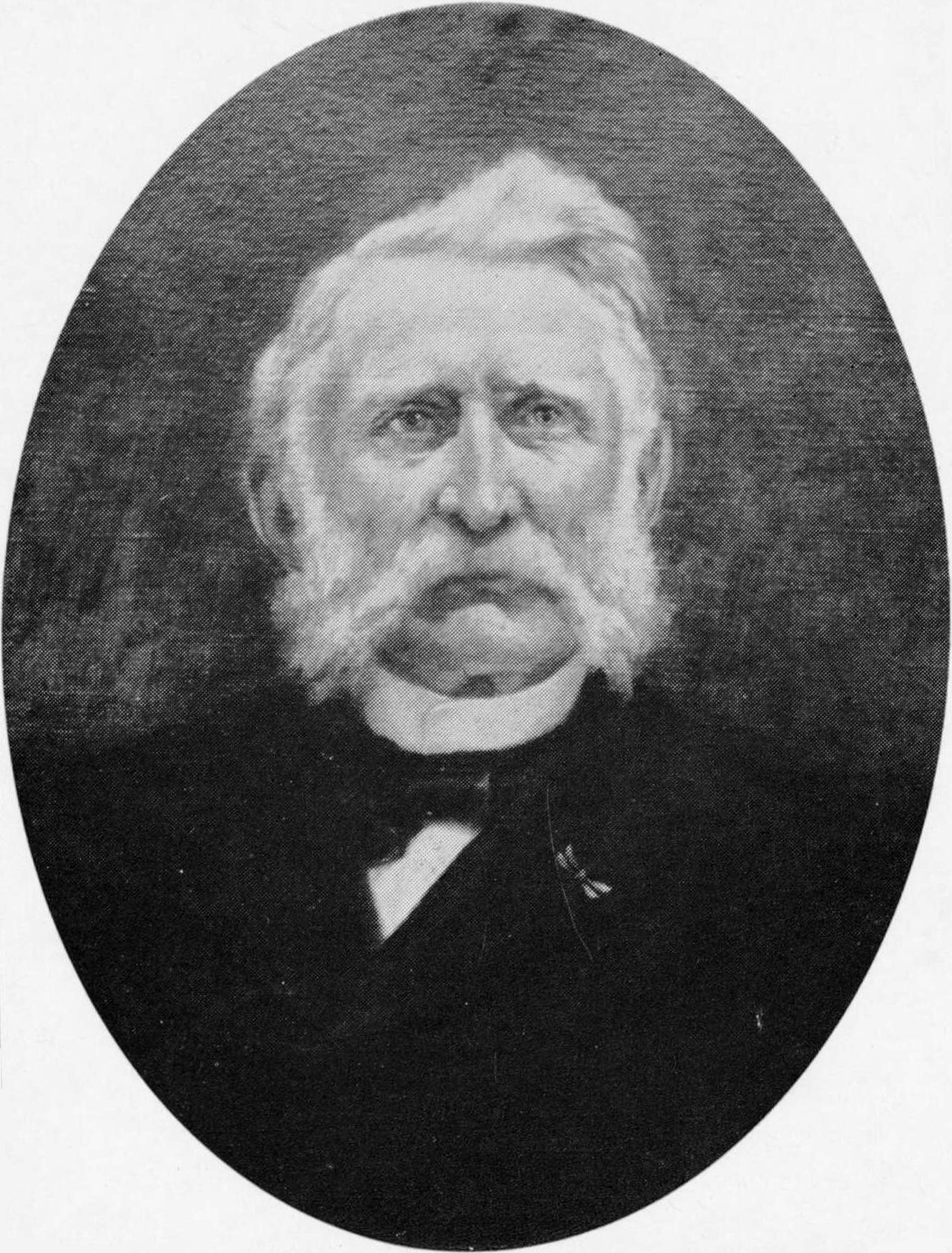 Portret van Christianus Antonius Houben (1824-1900), burgemeester van Stevensweert en Venlo, lid van de Provinciale Staten in het Hertogdom Limburg.